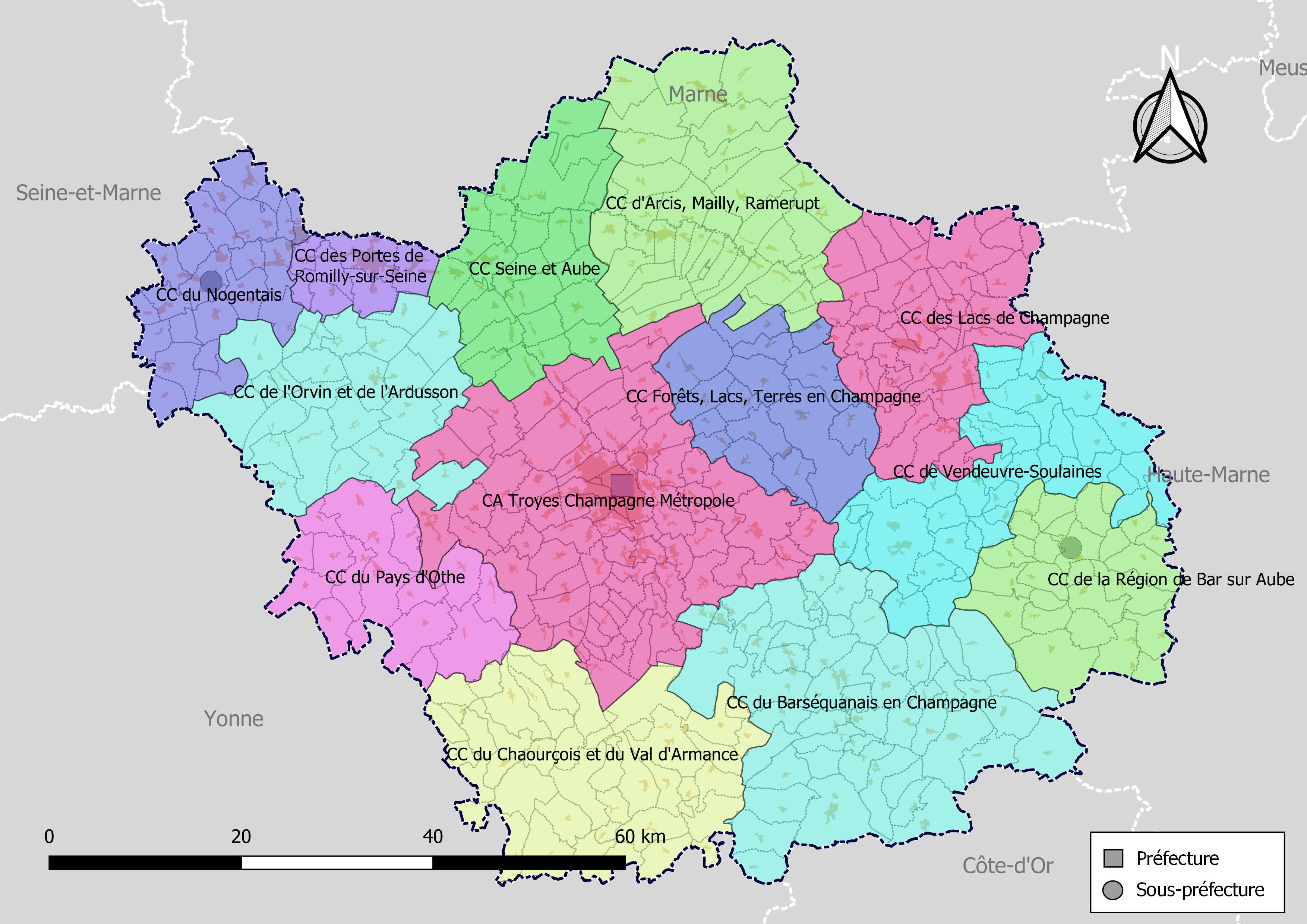 Carte des intercommunalités du département de l'Aube, France. Composition au 1er janvier 2019